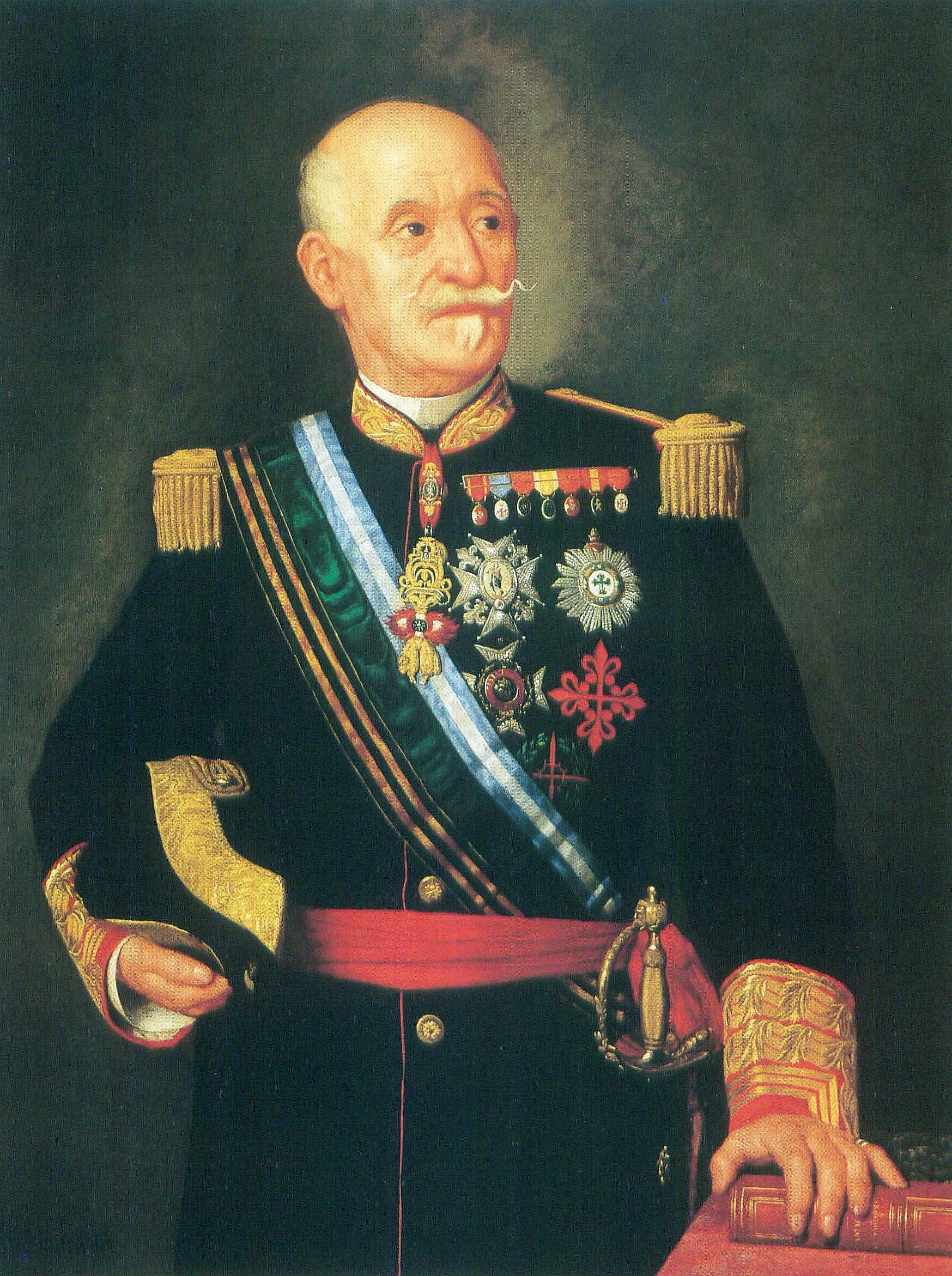 Retrato del aristócrata, militar y político español Francisco Javier Arias Dávila y Matheu (1812-1890), conde de Puñonrrostro y marqués de Maenza. Llegó a ser alcalde de Madrid, director general de Artillería, jefe superior de Palacio y presidente del Senado de España, y fue además caballero de la Orden del Toisón de Oro y de la Orden de Calatrava.